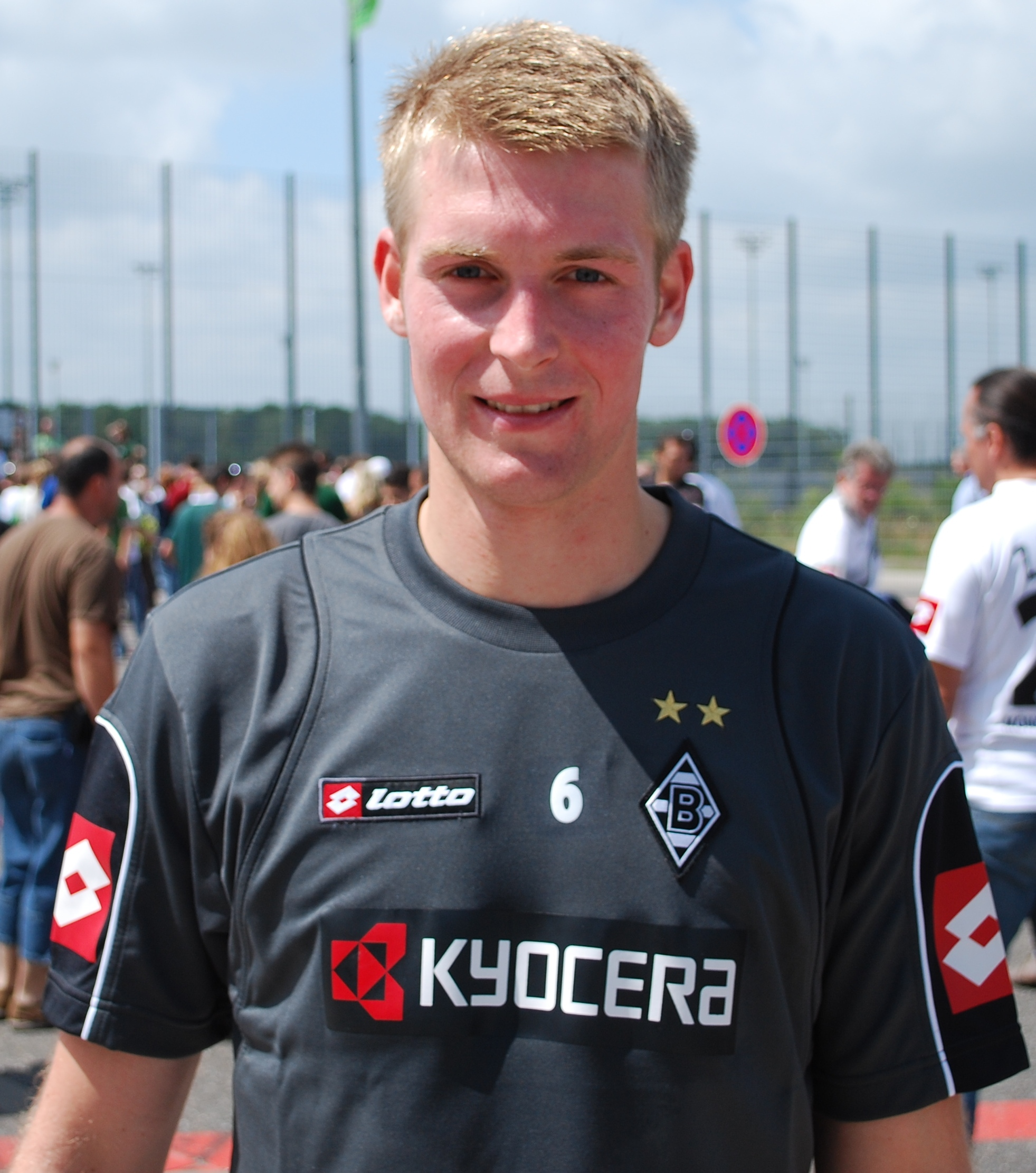 Jan Ingwer Callsen-Bracker